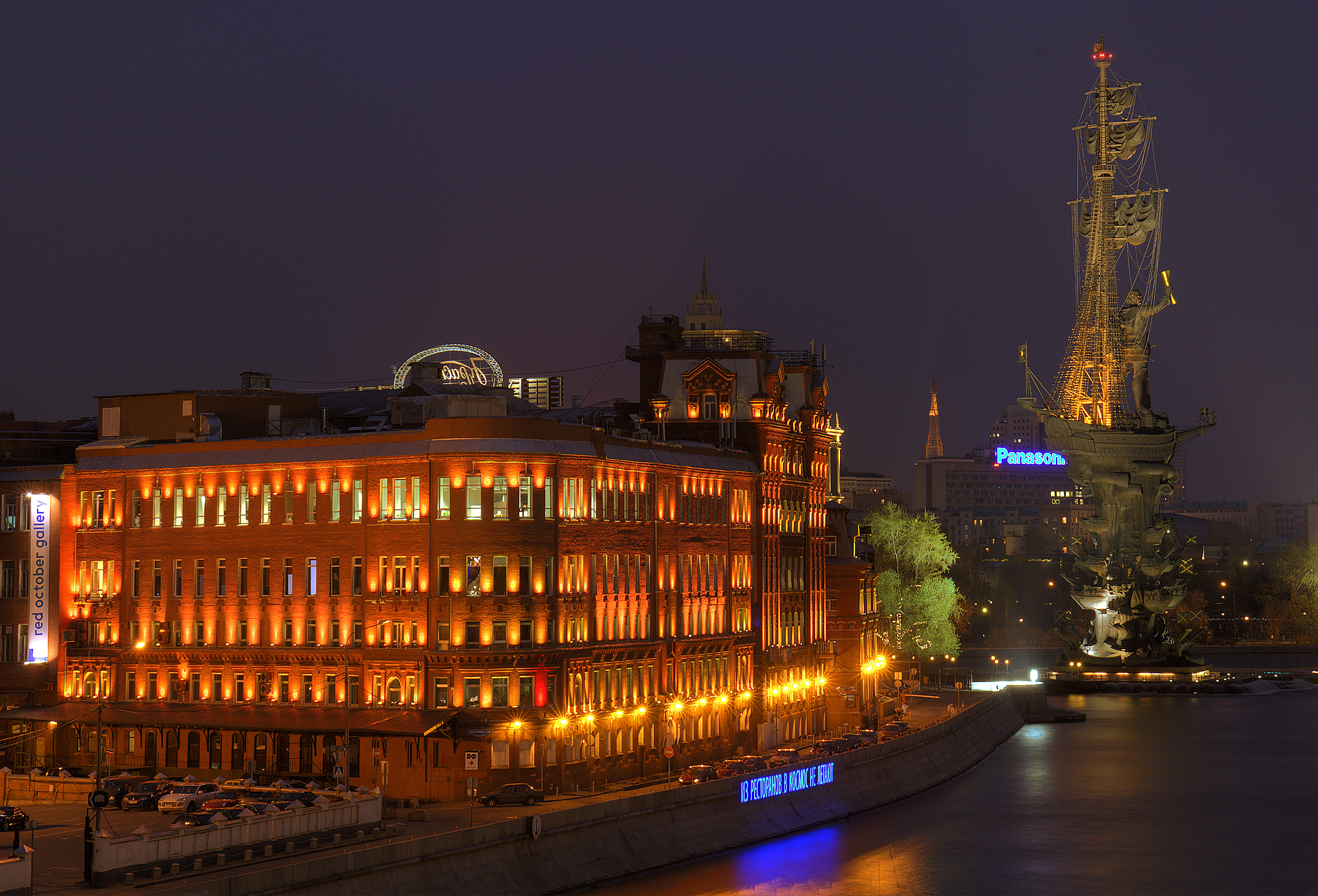 Москва Москва, Берсеневская набережная (на первом плане "Красный октябрь")